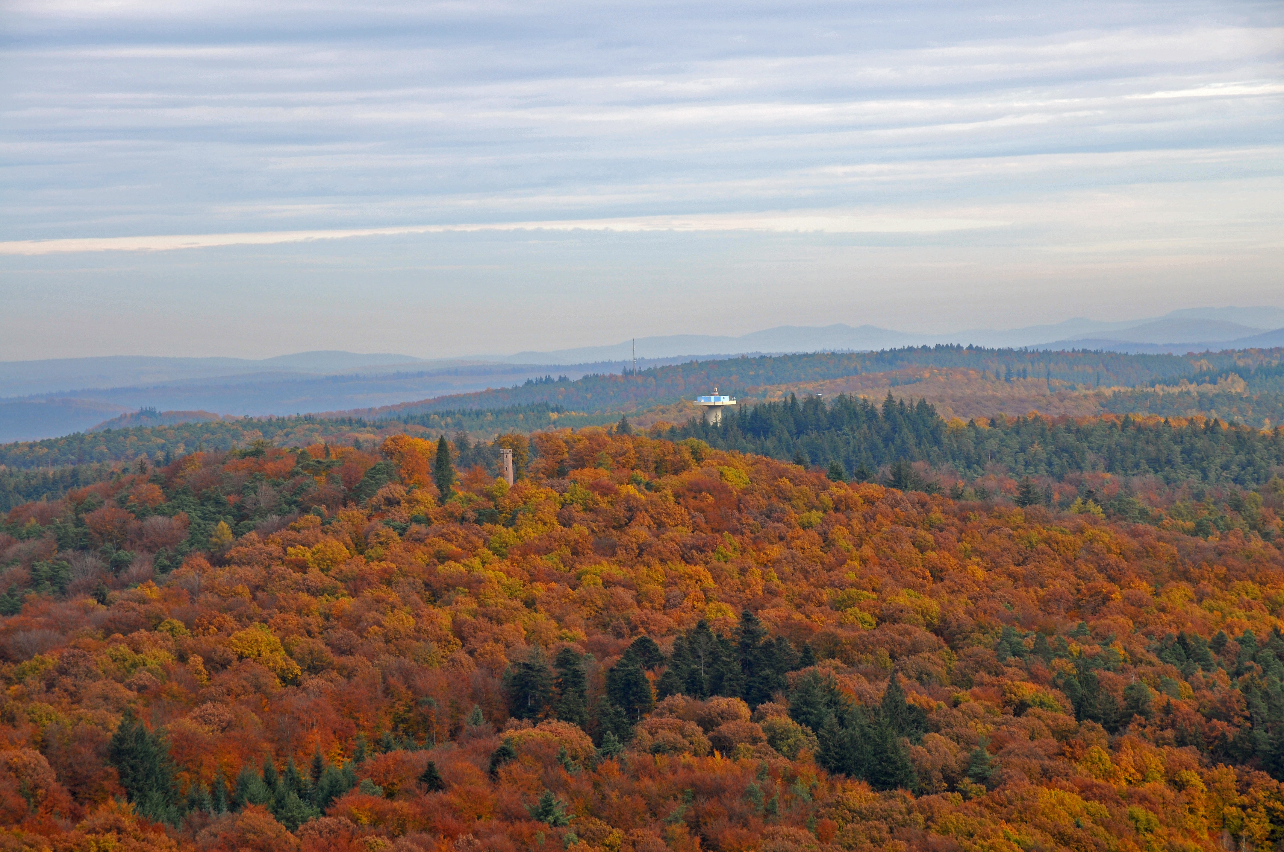 Gipfelbereich des Eschkopf mit dem Eschkopfturm. Dahinter die Sekundär-Radaranlage "Pfälzer Wald" der Deutschen Flugsicherung.